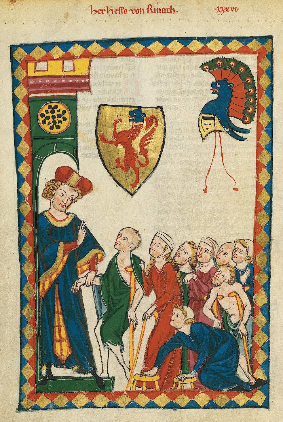 Codex Manesse, UB Heidelberg, Cod. Pal. germ. 848, fol. 113v: Herr Hesso von Reinach